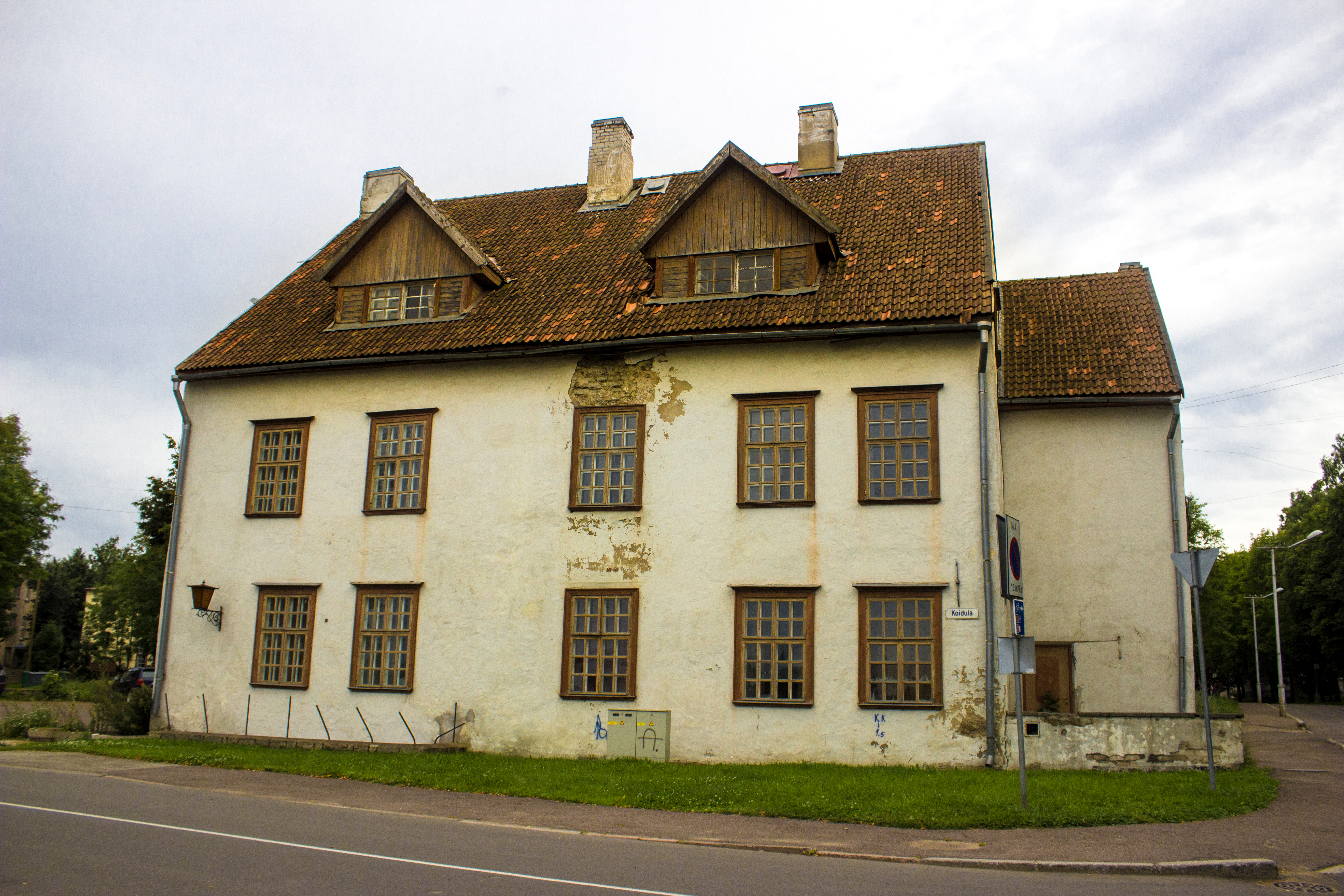 Narva